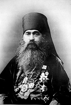 Архиепископ Приморский и Владивостокский Евсевий (Никольский). Фото начала XX века